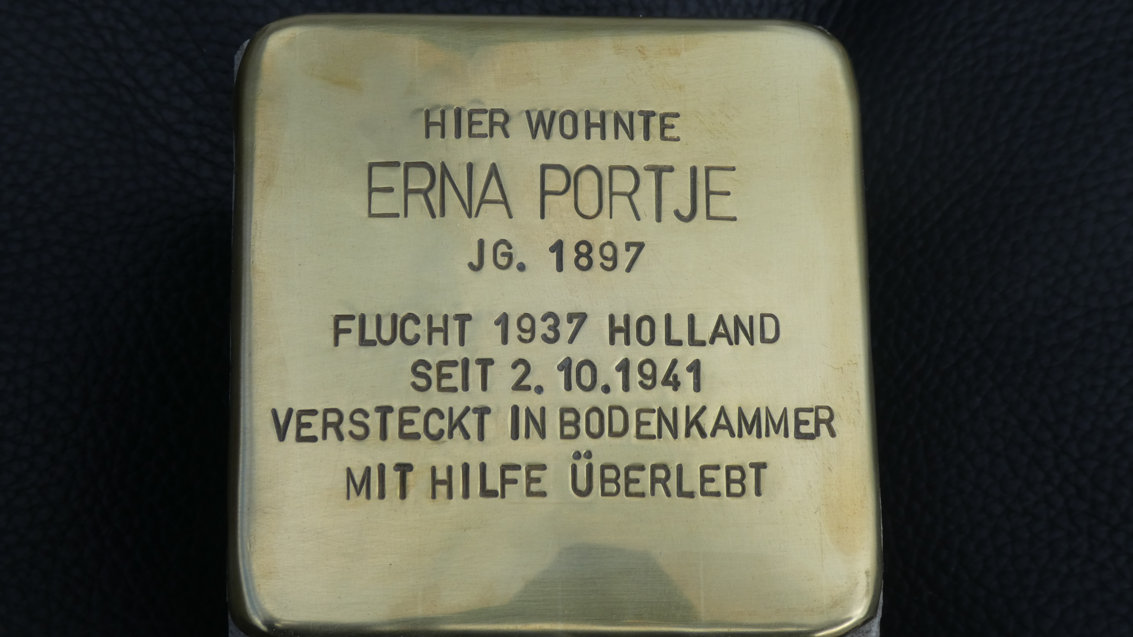 Erna Portje, 2018